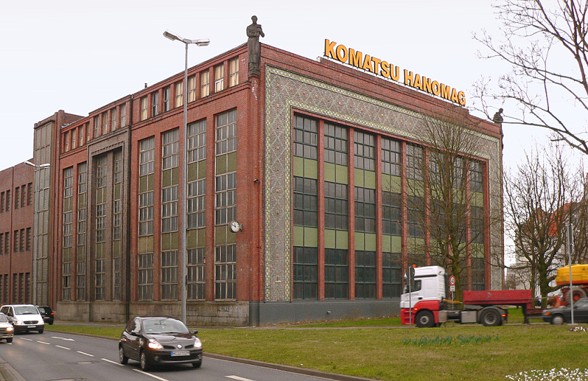 Früheres Hanomag Fabrikgebäude in Hannover